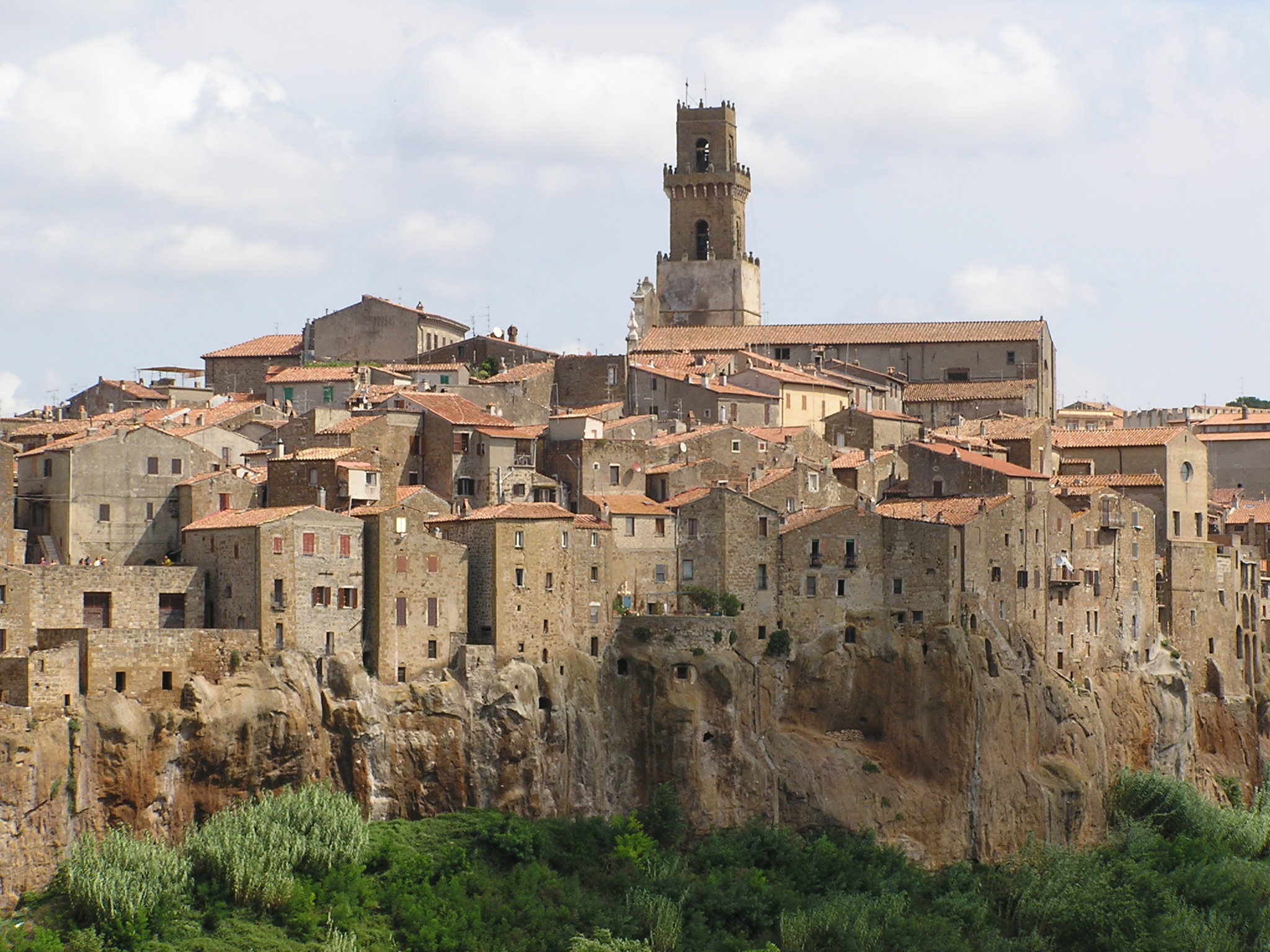 Pitigliano, Ort & Datum: Ende August 2006